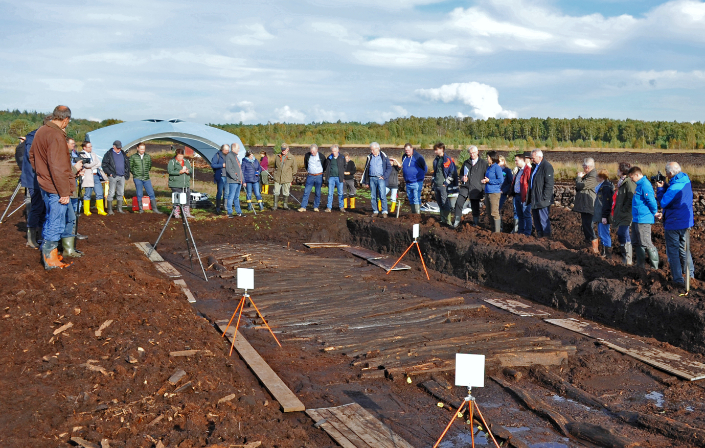 Moorweg im Aschener Moor, Besuch der Ausgrabung durch den niedersächsischen Wissenschaftsminister Björn Thümler